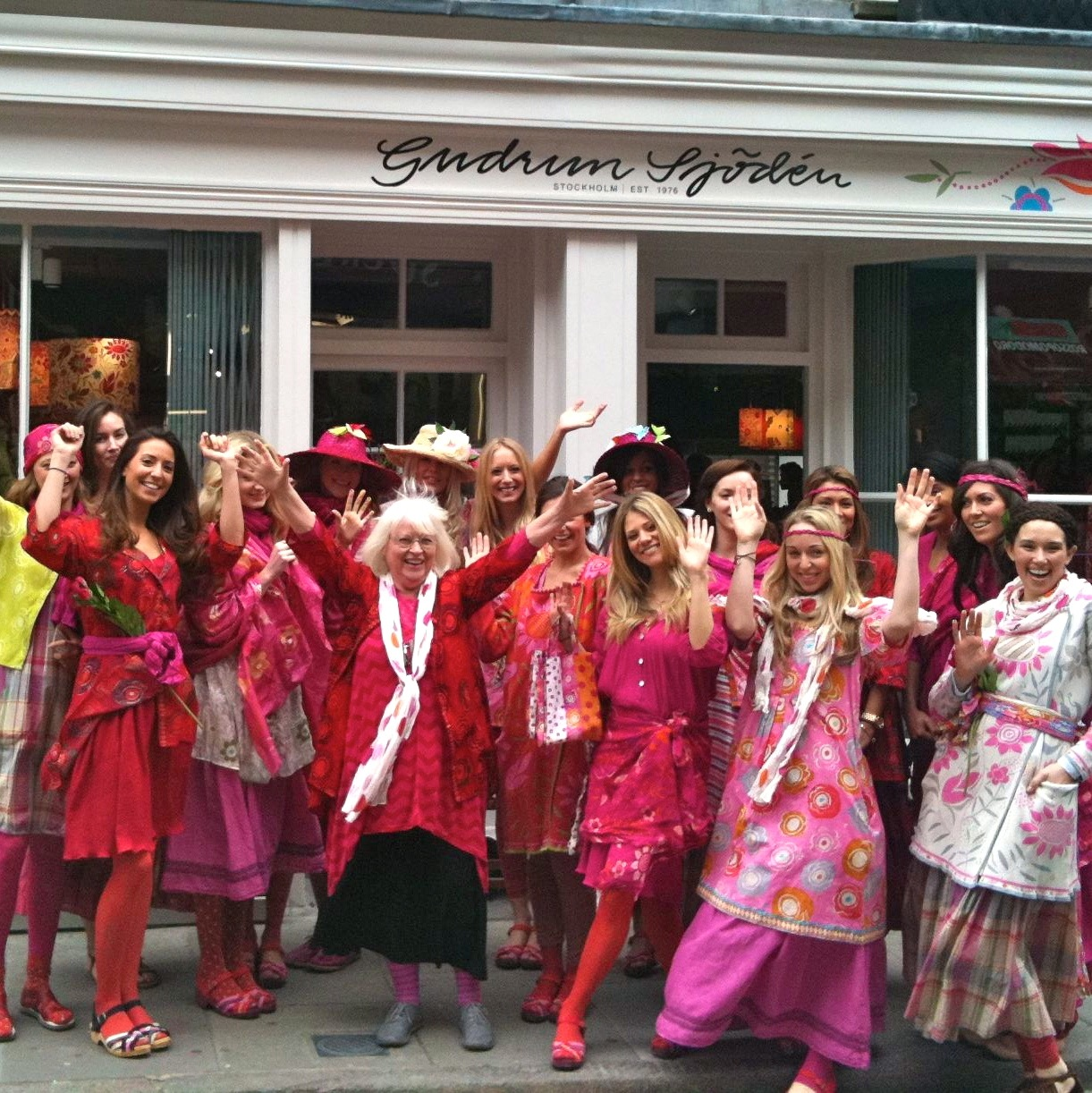 Gudrun Sjödén inviger sin första butik i London 2012.